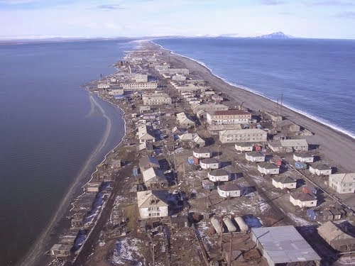 Uelen z výšky